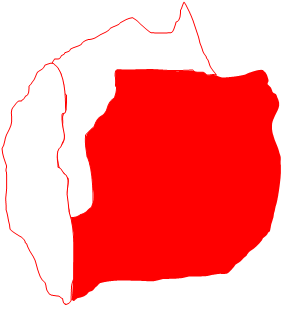 Ubicación de la parroquia José Gregorio Bastidas en el municipio Palavecino, estado Lara